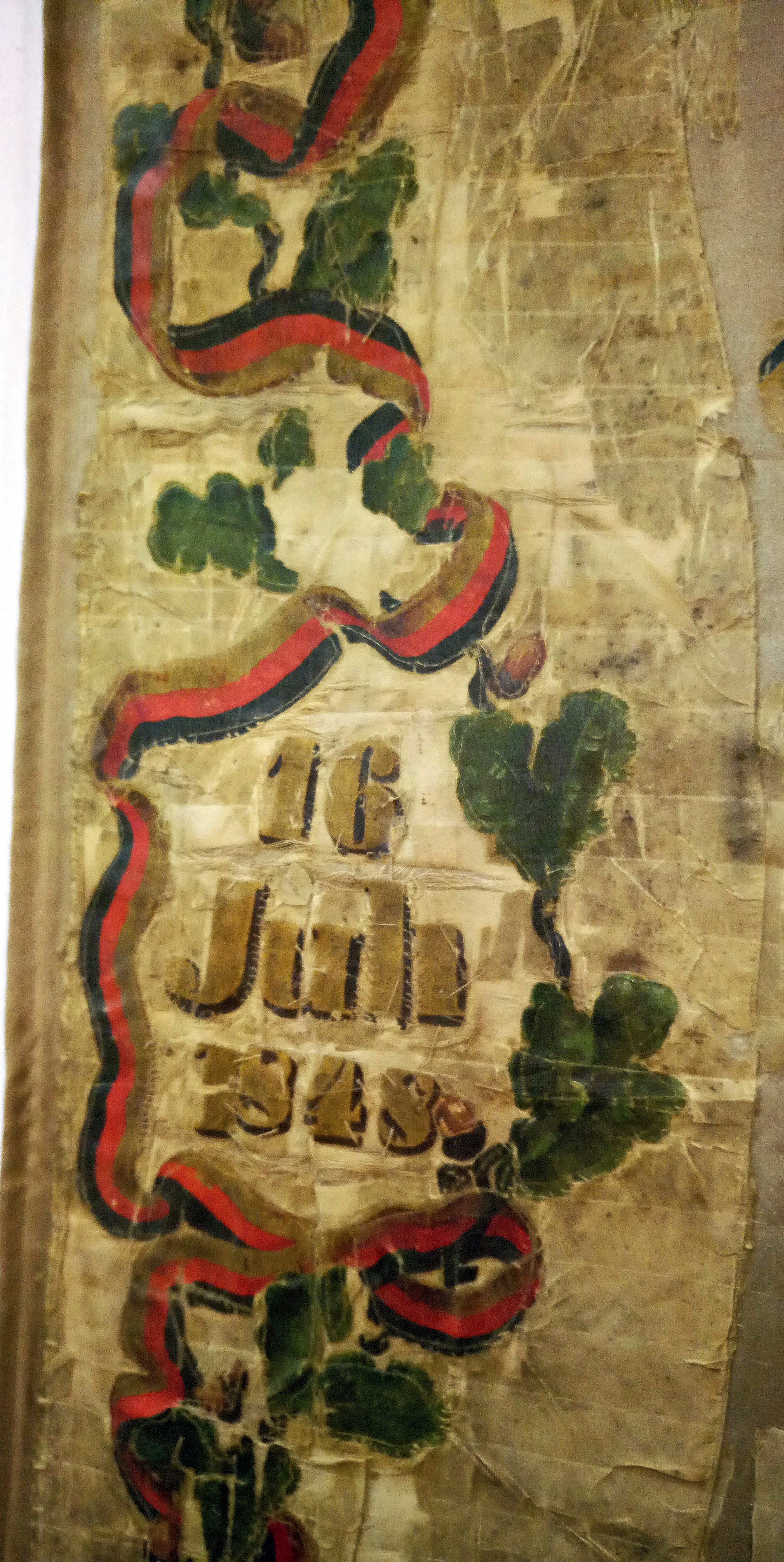 Fahne Gesangverein Kindenheim, von 1848, heute Stadtmuseum Grünstadt